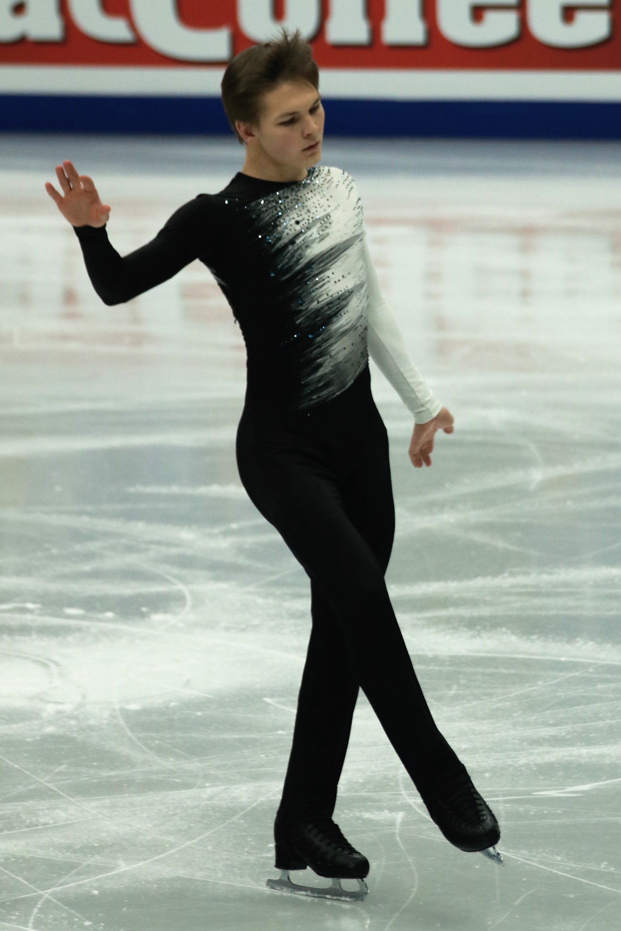 Михаил Коляда (Россия) на Чемпионате Европы по фигурному катанию 2018.